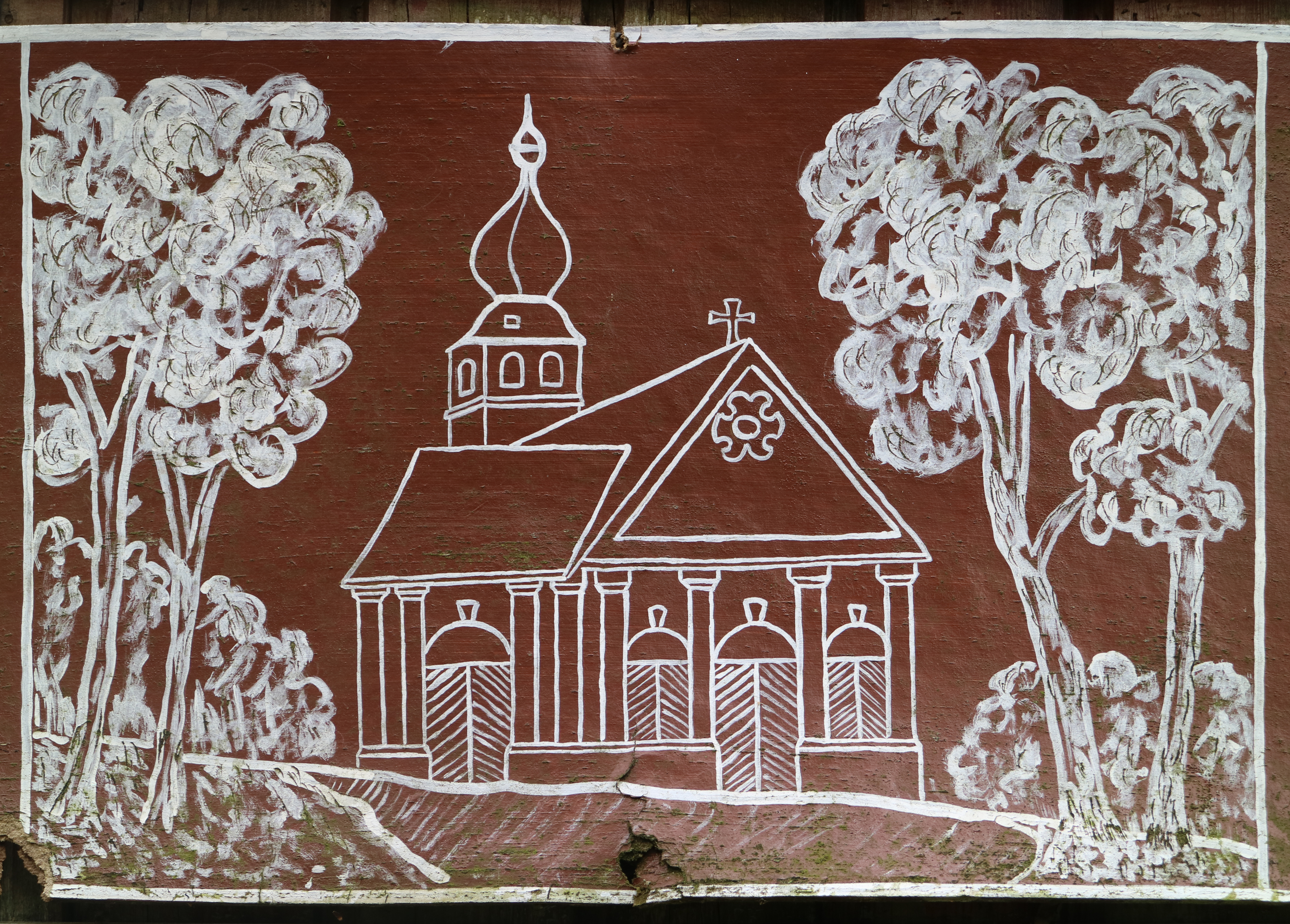 Zeichnung der Florianikriche, Graz-Straßgang